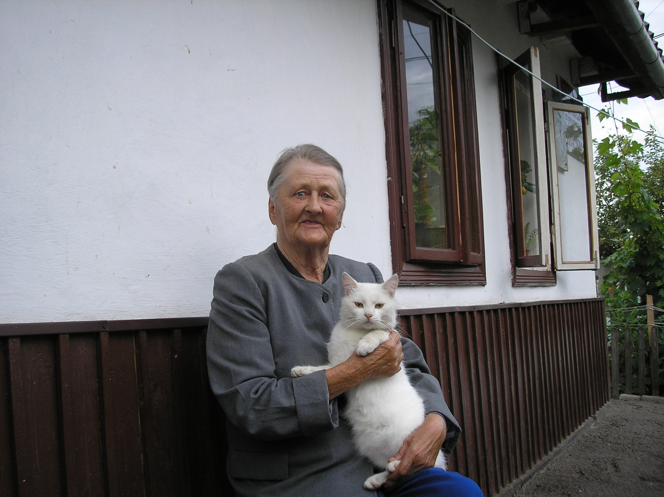 Бабуся Ані Лорак (Яніна Юліанівна Дмитрієнко) з котом. Кіцмань. Липень 2005